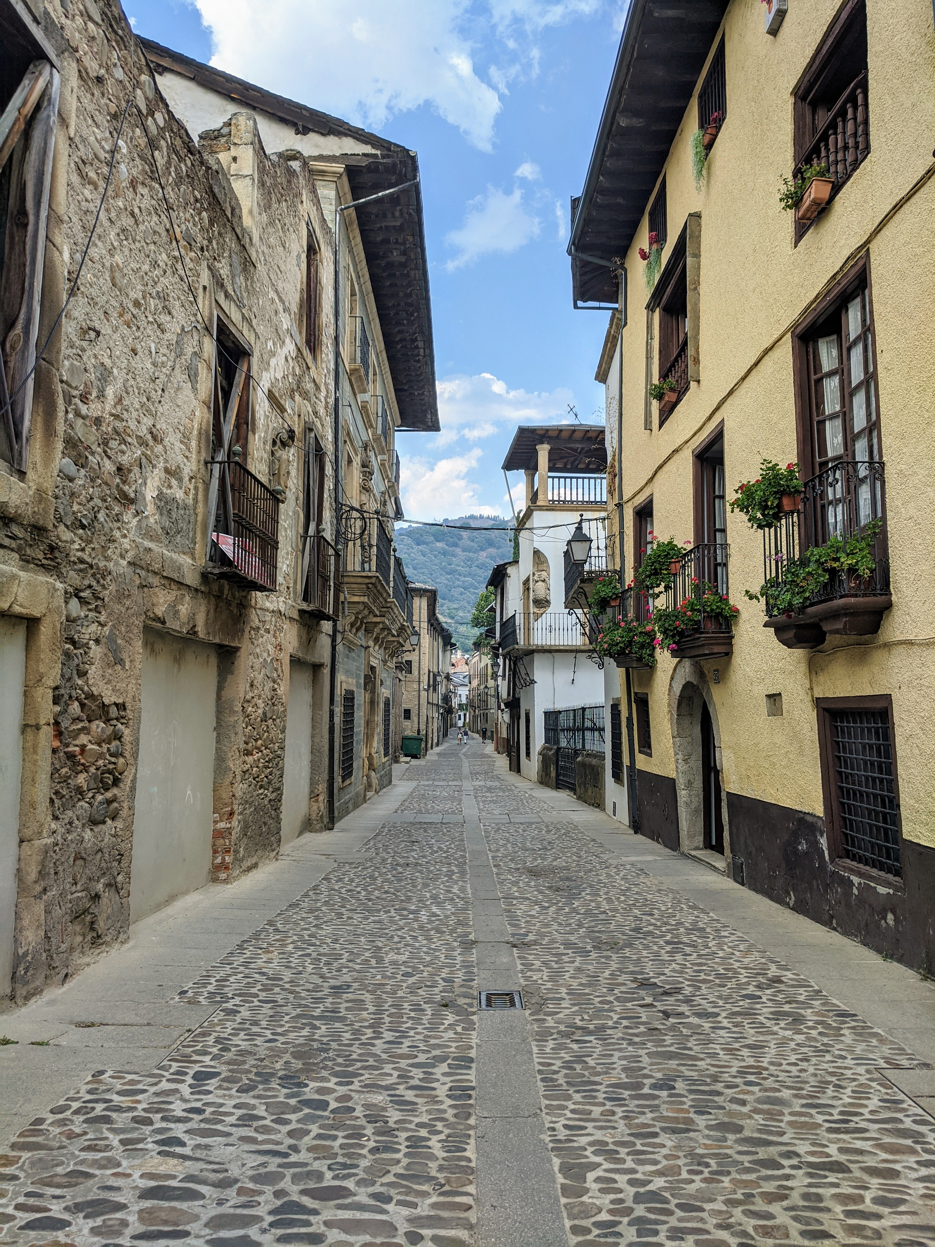 Vista parcial de la llamada calle del Agua, en Villafranca del Bierzo (León, España).